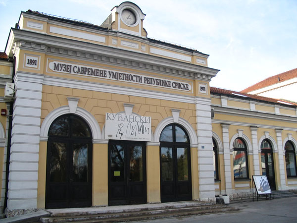 Музеј савремене умјетности Републике Српске